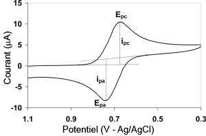 Voltampérogramme (version française / french version)